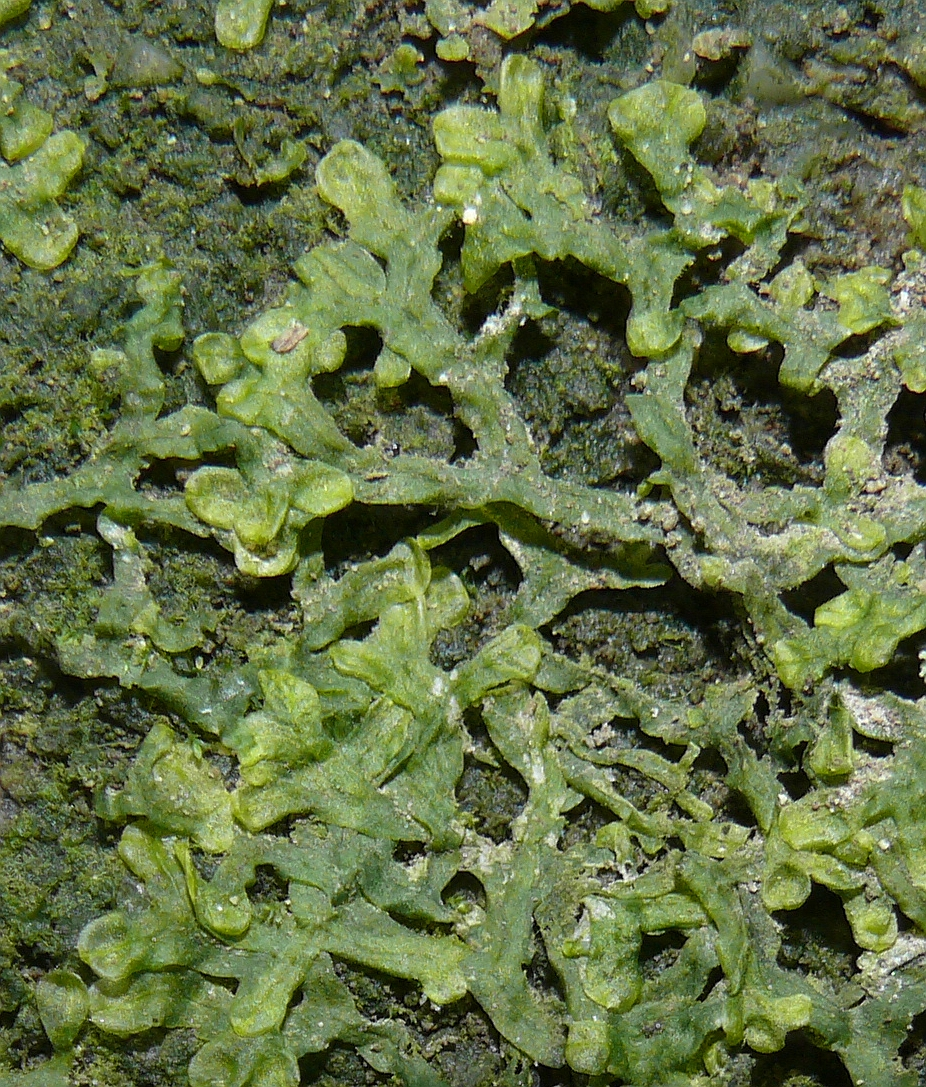 Metzgeria conjugata, Schwäbisch-Fränkische Waldberge, Germany